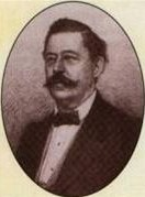 Max Machanek, rakouský podnikatel a politik